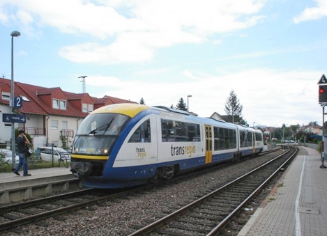 Siemens Desiro Classic der Trans Regio in Ramstein